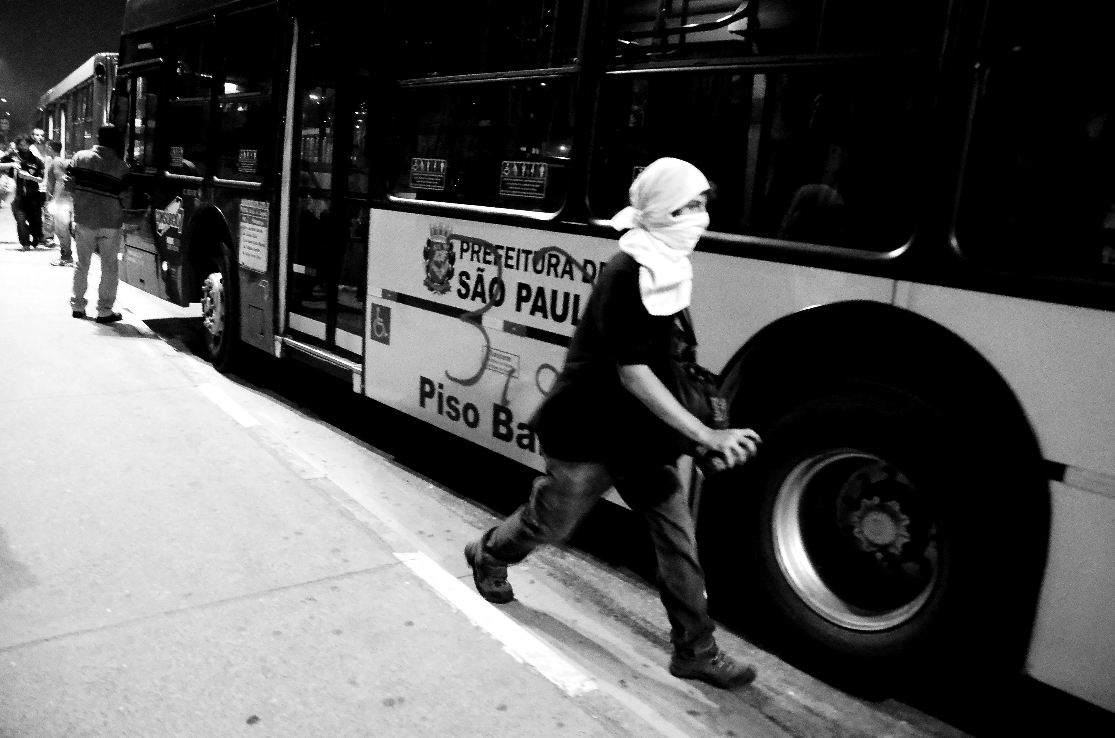 Desde domingo, estão em vigor as novas tarifas de ônibus, metrô e trem na capital paulista, que subiram de R$ 3 para R$ 3,20,o que está gerando bastante revolta nos jovens em todo país ,que acontece não só em São Paulo,mas em outros estados do Brasil,com a resposta Para garantir o reajuste de 6,7%, abaixo da inflação, a presidente Dilma Rousseff assinou na sexta-feira, 31, Medida Provisória que reduz para zero as alíquotas de dois tributos federais, o PIS e a Cofins, sobre as passagens de transporte urbano em todo o País . (CC-BY-SA) Maria Objetiva